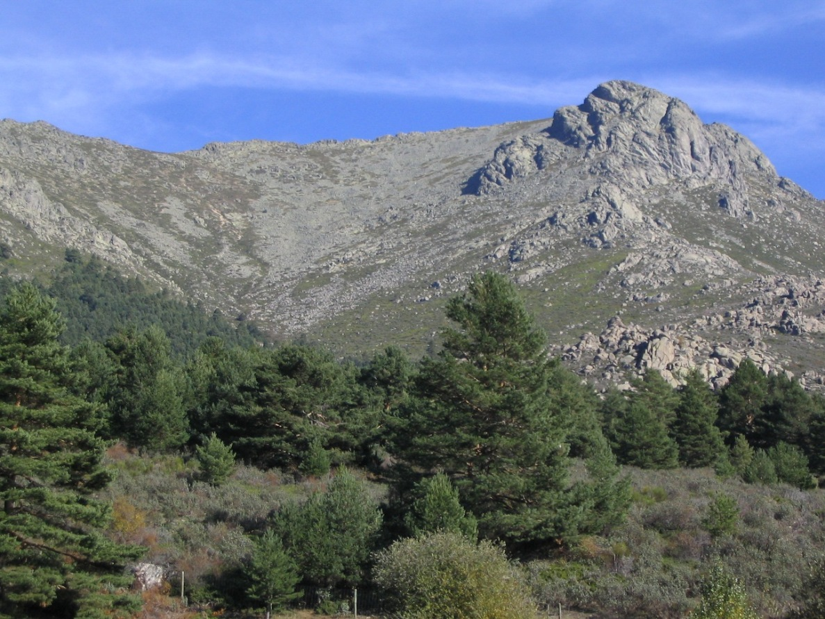 es: Pico de La Maliciosa con Pinus sylvestris